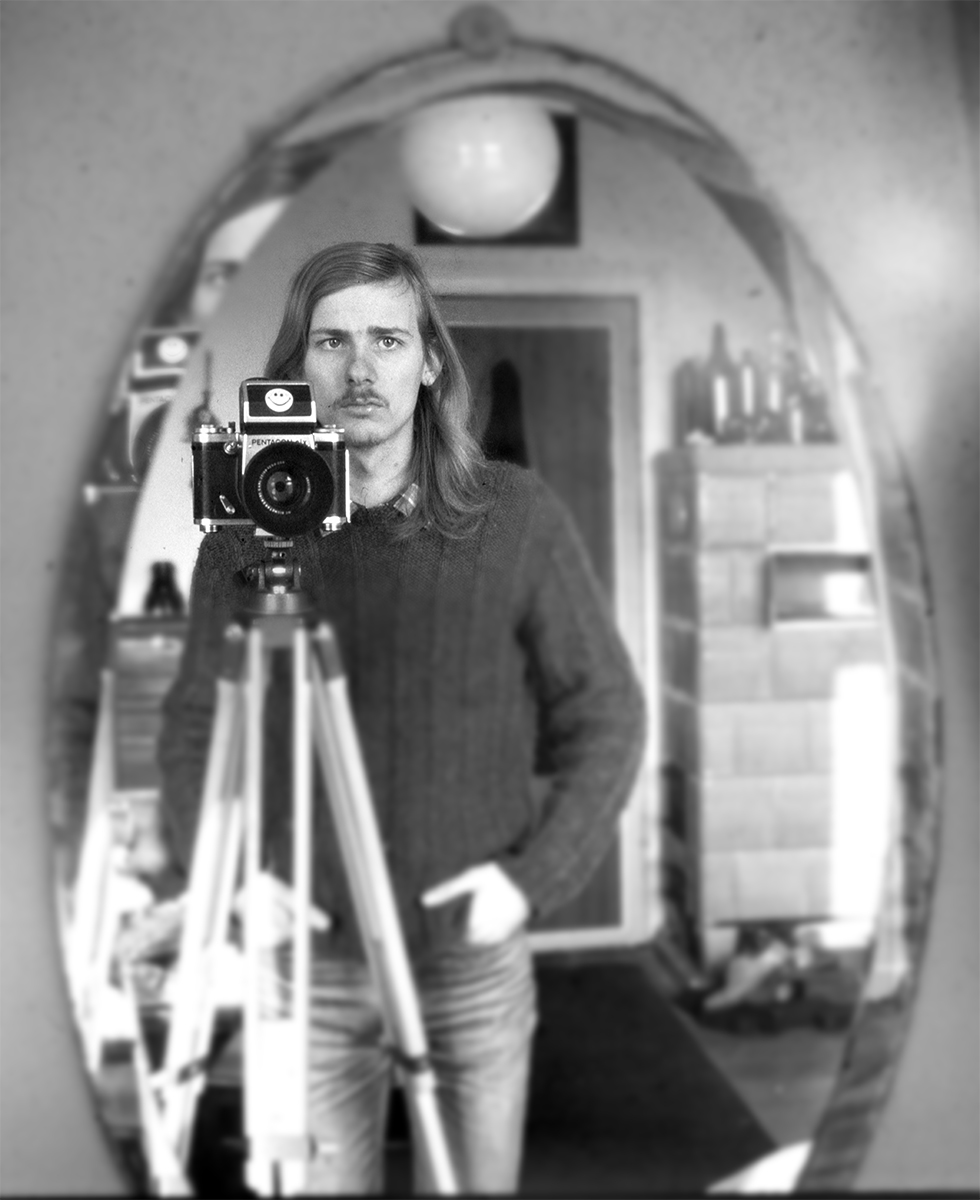 Gerd Danigel im Spiegel mit 6x6-Kamera Pentacon SIX